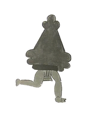 Glifo del peñón de los baños representados en los códices mendoza y azcatitlan